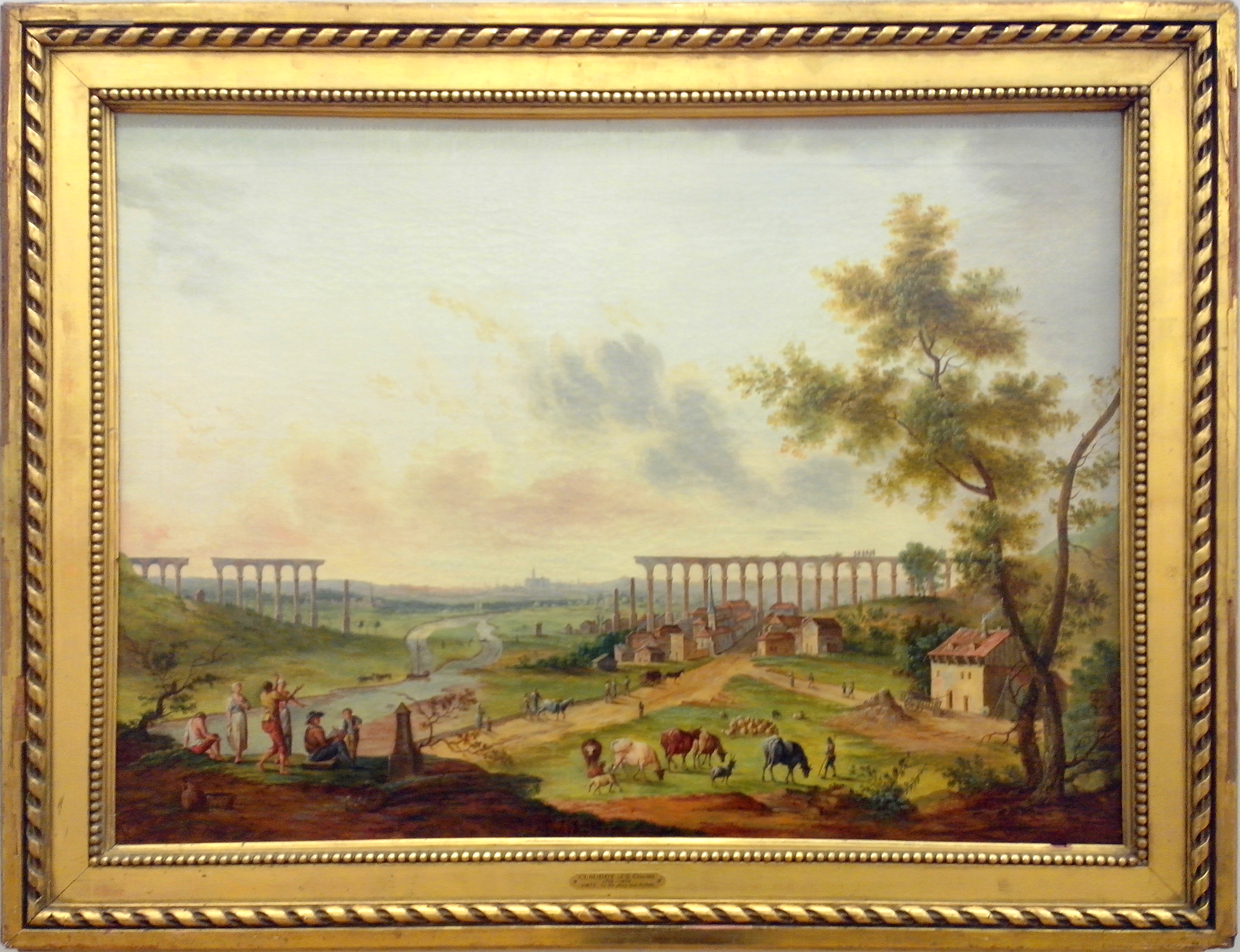 Peinture de l'exposition permanente du Musée de la Cour d'Or de Metz. Illustre la construction des arches de Jouy-aux-Arches.